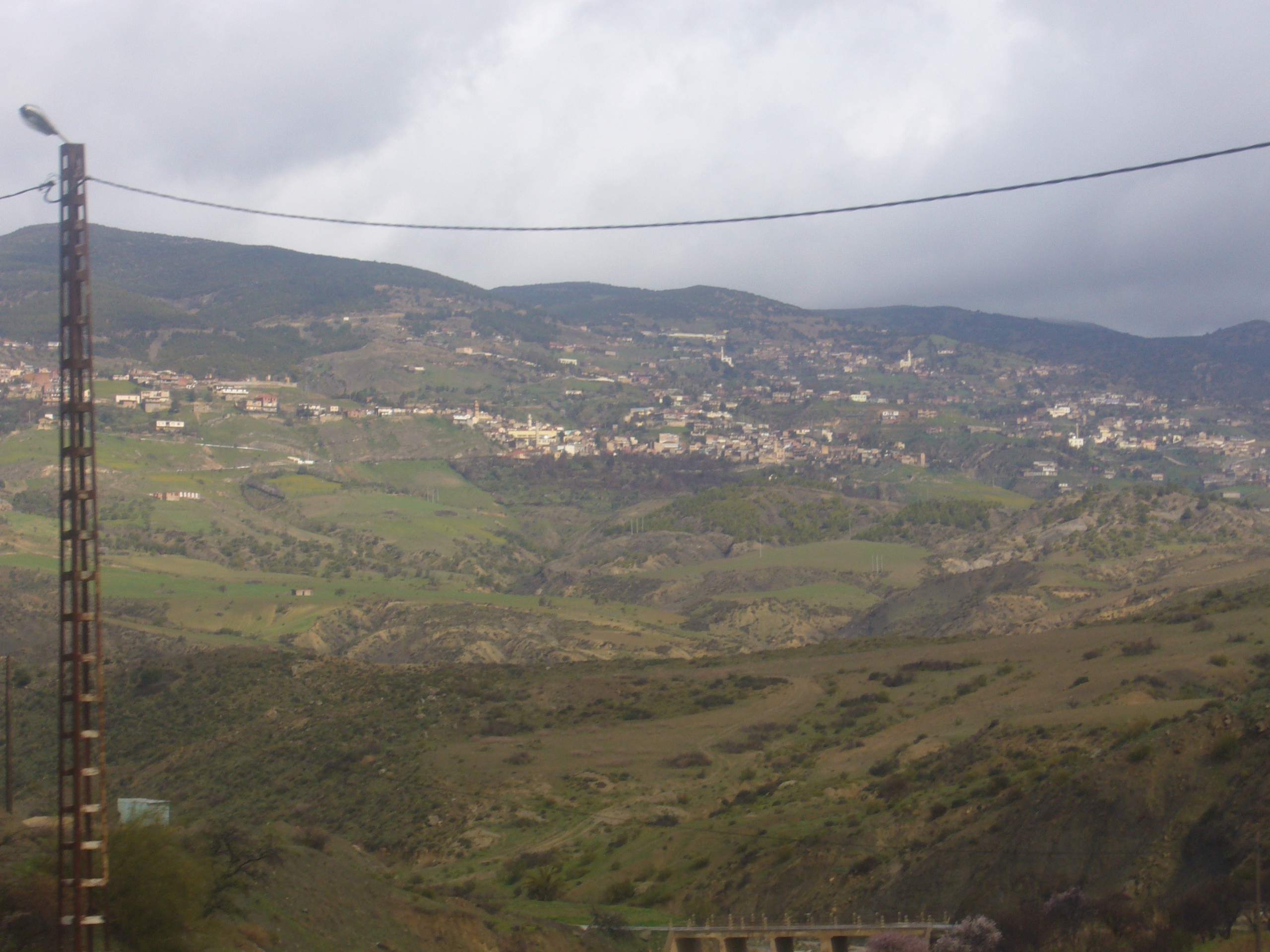 Reliefs. Bordj Zemoura en Kabylie (Bordj Bou Arréridj, Algérie).